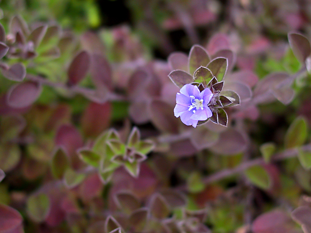 Evolvulus pilosus